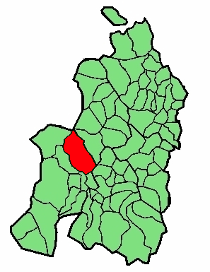 Ortzaize udalerriaren kokapena Nafarroa Beherean